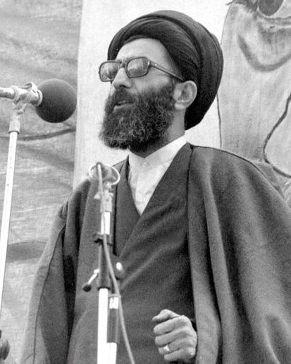 سید علی خامنه ای به عنوان امام جمعه تهران در سال 1358 مصادف با 1980 میلادی